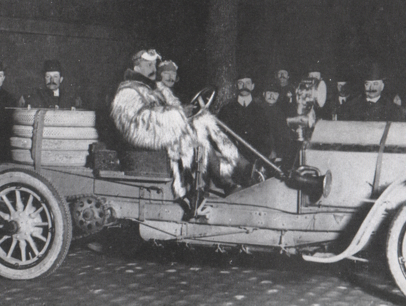 Auto-Rallye Paris-Madrid. Automobilistenmäntel aus Ziegenfell.